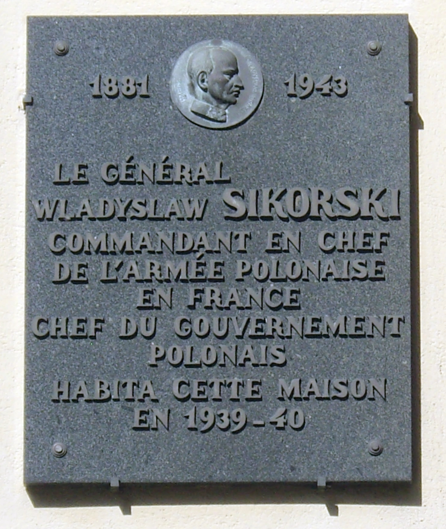 Plaque apposée au n° 58 de la rue Jacob, Paris 6e, où habita le chef du gouvernement polonais Władysław Sikorski (1881-1943) en 1939-1940.